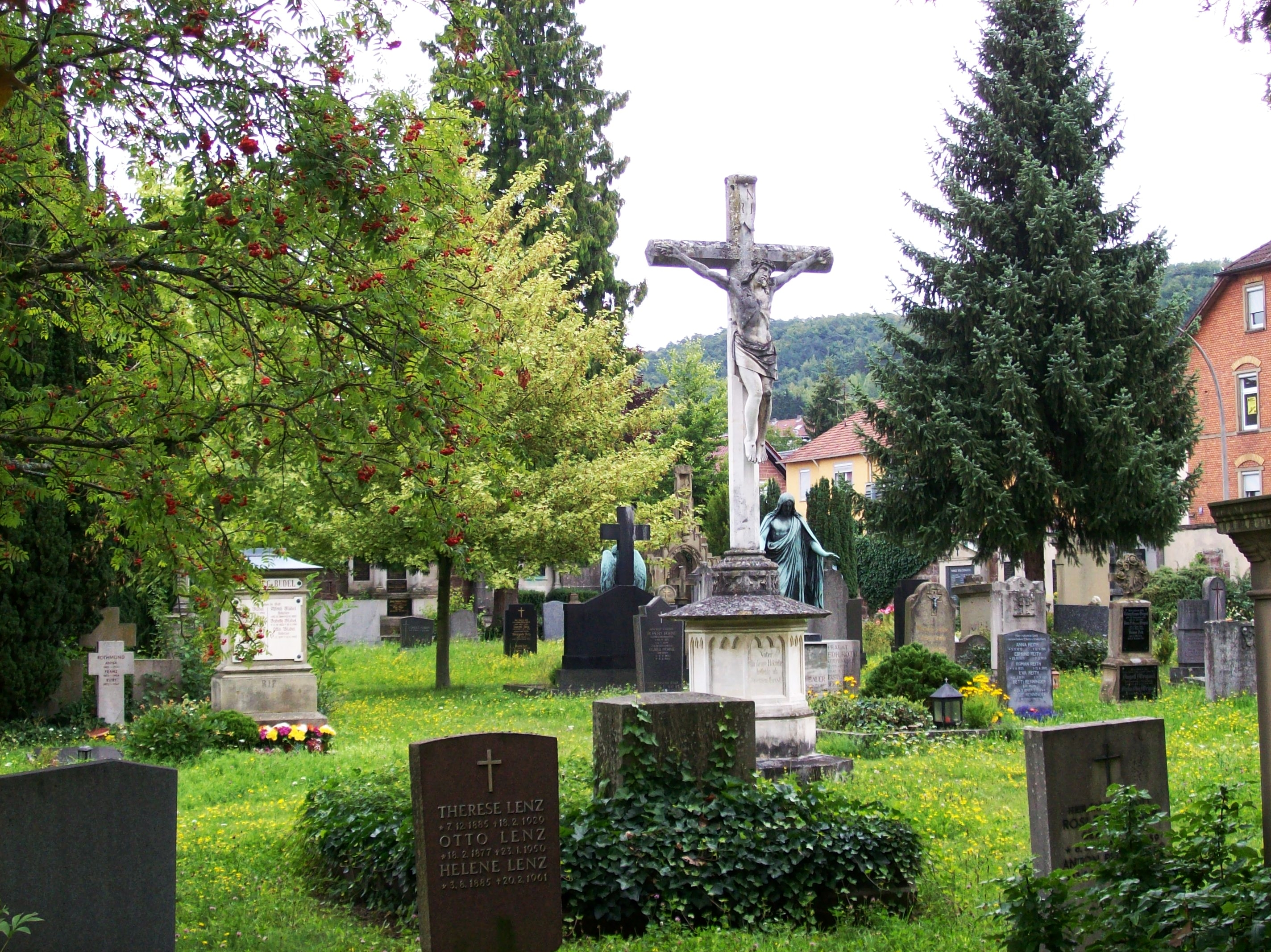 97688 Bad Kissingen, Germany